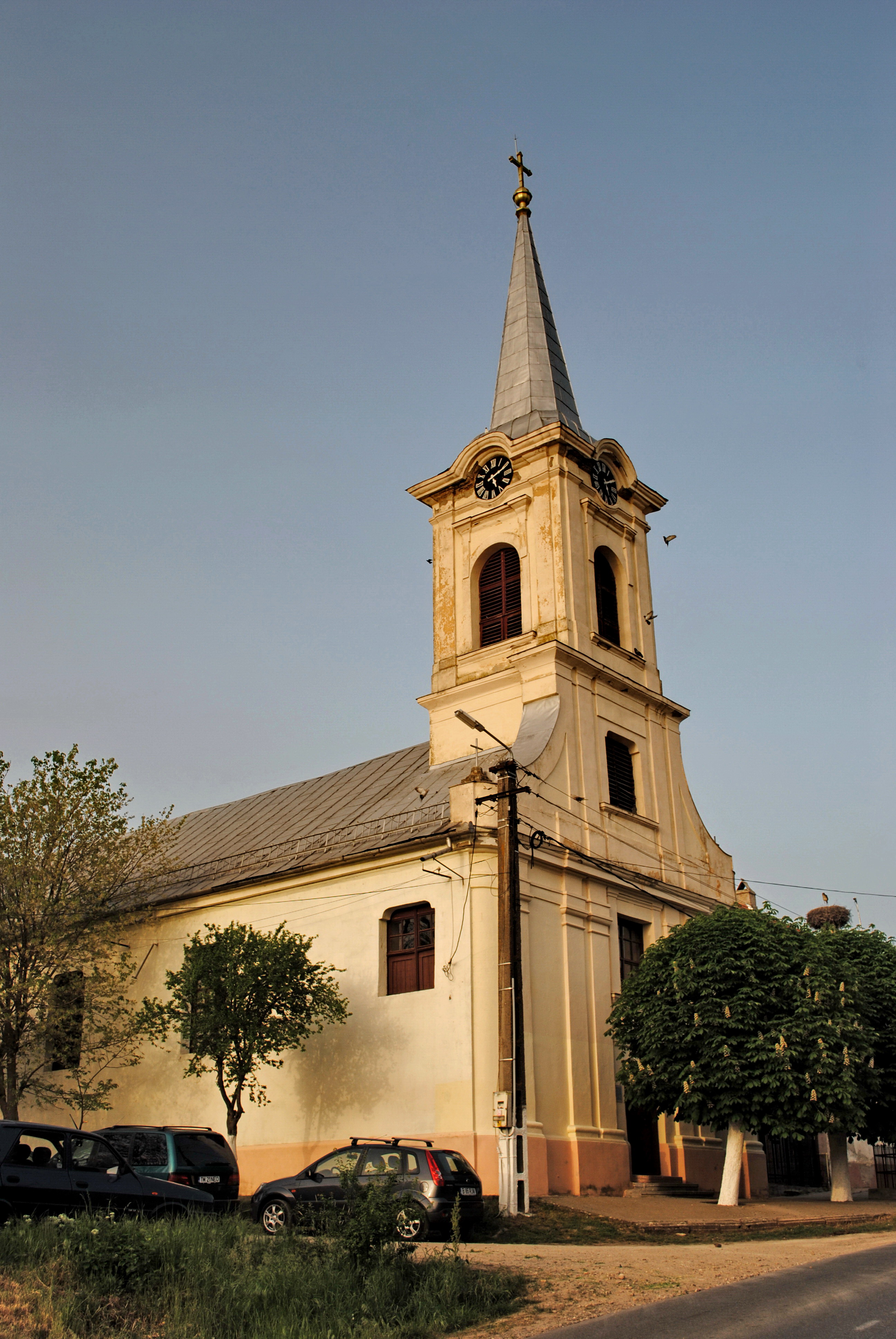 Biserica romano-catolică "Înălțarea Crucii"